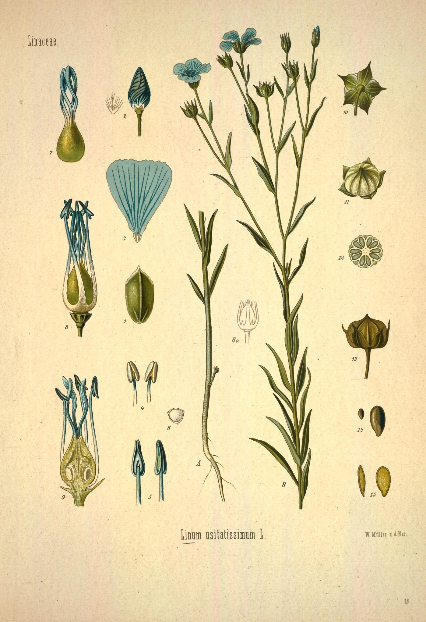 Lein. A B Pflanze in natürl. Grösse; 1 Kelchblatt, vergrössert; 2 Blüthenknospe ohne Kelch, desgl.; 3 Kronblatt desgl.; 4 u. 5 Staubgefässe von verschiedenen Seiten, desgl.; 6 Pollenkorn, desgl.; 7 Stempel mit zusammengedrehten Griffeln, desgl.; 8 Blüthe von Kelch und Krone befreit, ohne die unfruchtbaren Staubgefässe, desgl.; 8a dieselbe mit den unfruchtbaren Staubgefässen desgl.; 9 dieselbe im Längsschnitt, desgl.; 10 u. 11 junge Frucht von verschiedenen Seiten, desgl.; 12 dieselbe im Querschnitt, desgl.; 13 reife Frucht, desgl.; 14 Same, natürl. Grösse und vergrössert; 15 derselbe im Längsschnitt, desgl.